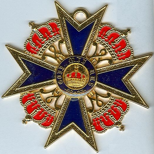 Scan. Particuliere verzameling Groningen.(mijn eigen verzameling) Robert Prummel 2007